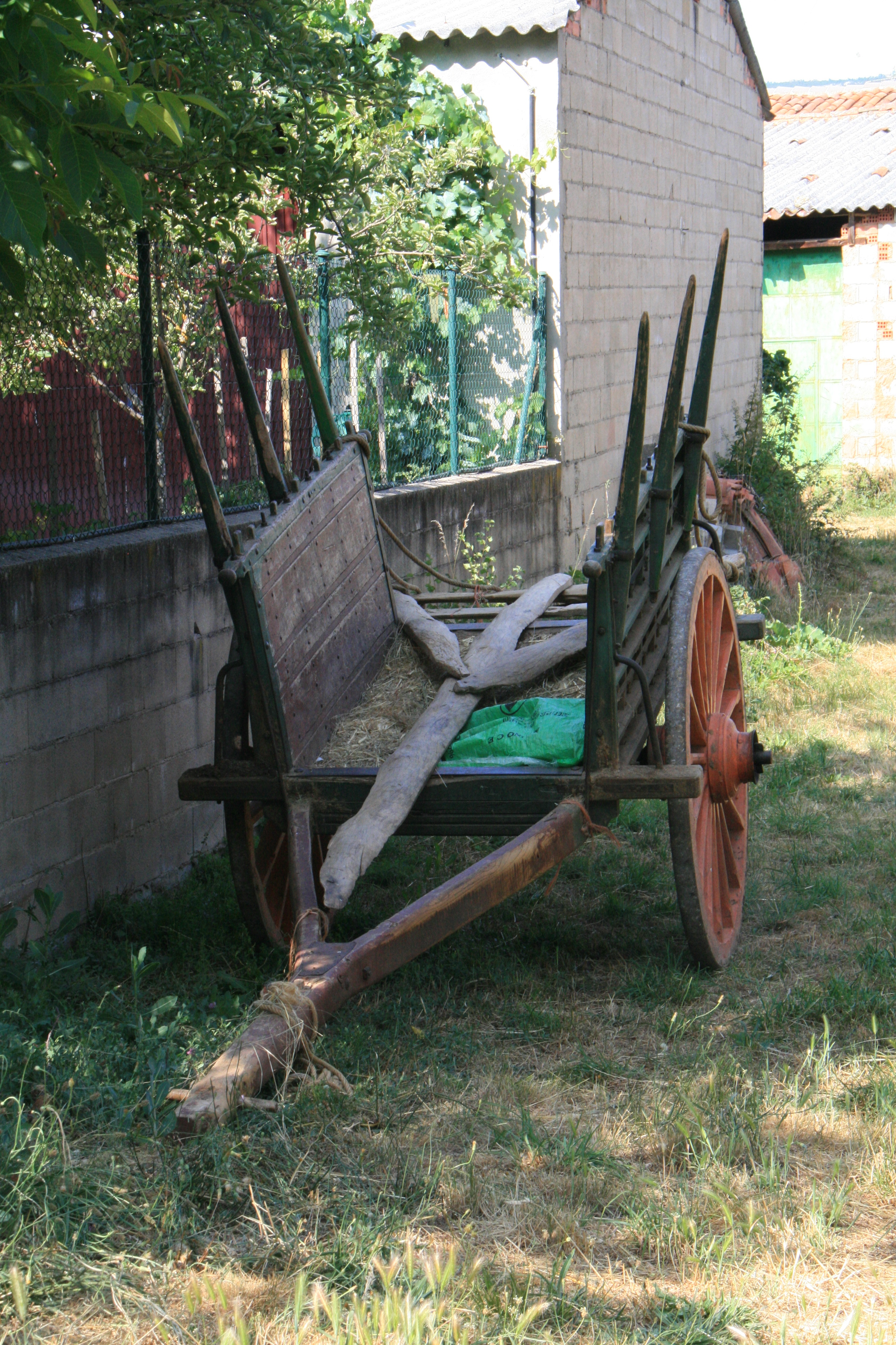 Carro Alistano - Vestido